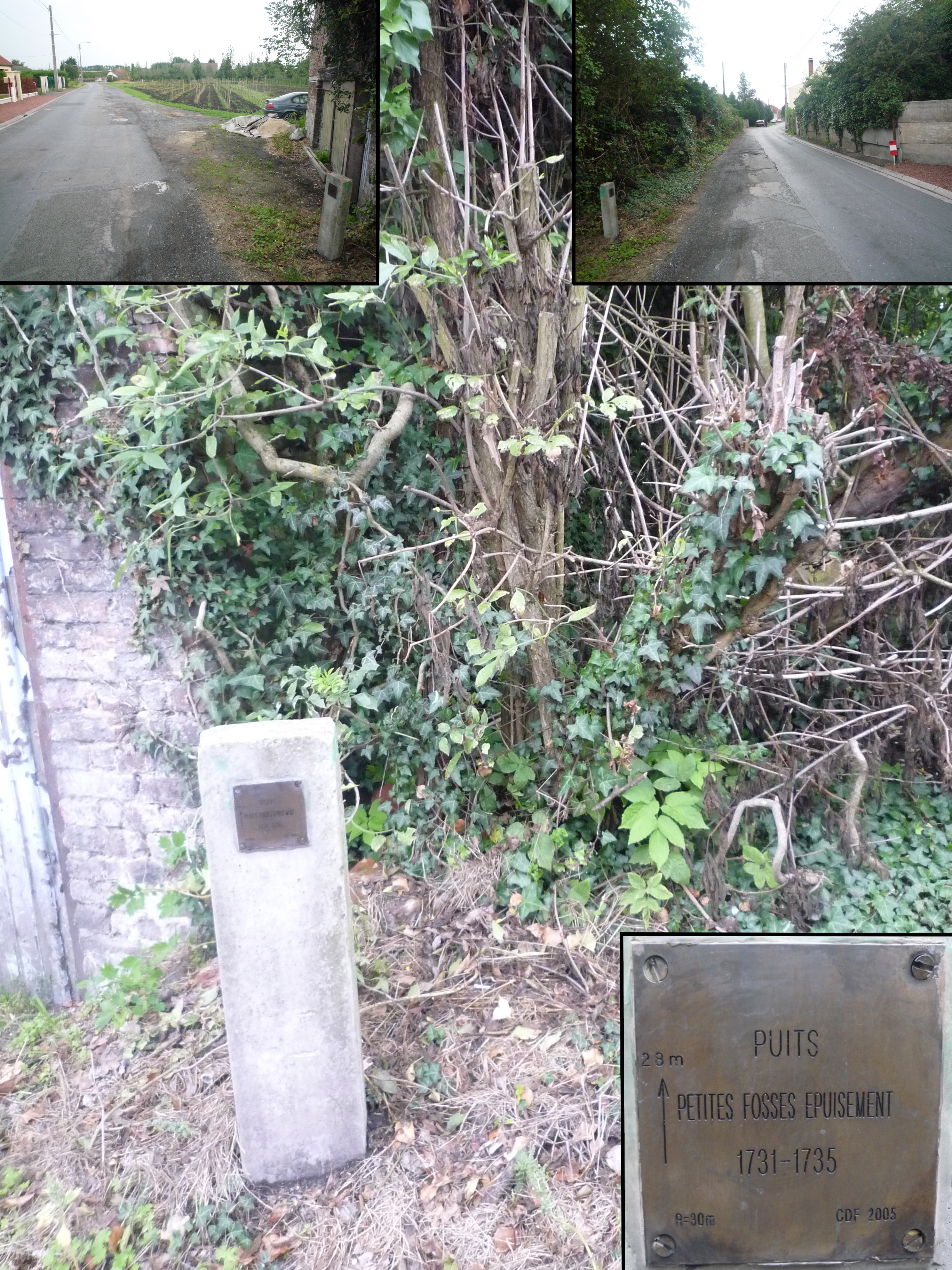 Puits Petites Fosses Épuisement de la Compagnie des mines d'Anzin à Fresnes-sur-Escaut, Nord, Nord-Pas-de-Calais, France.